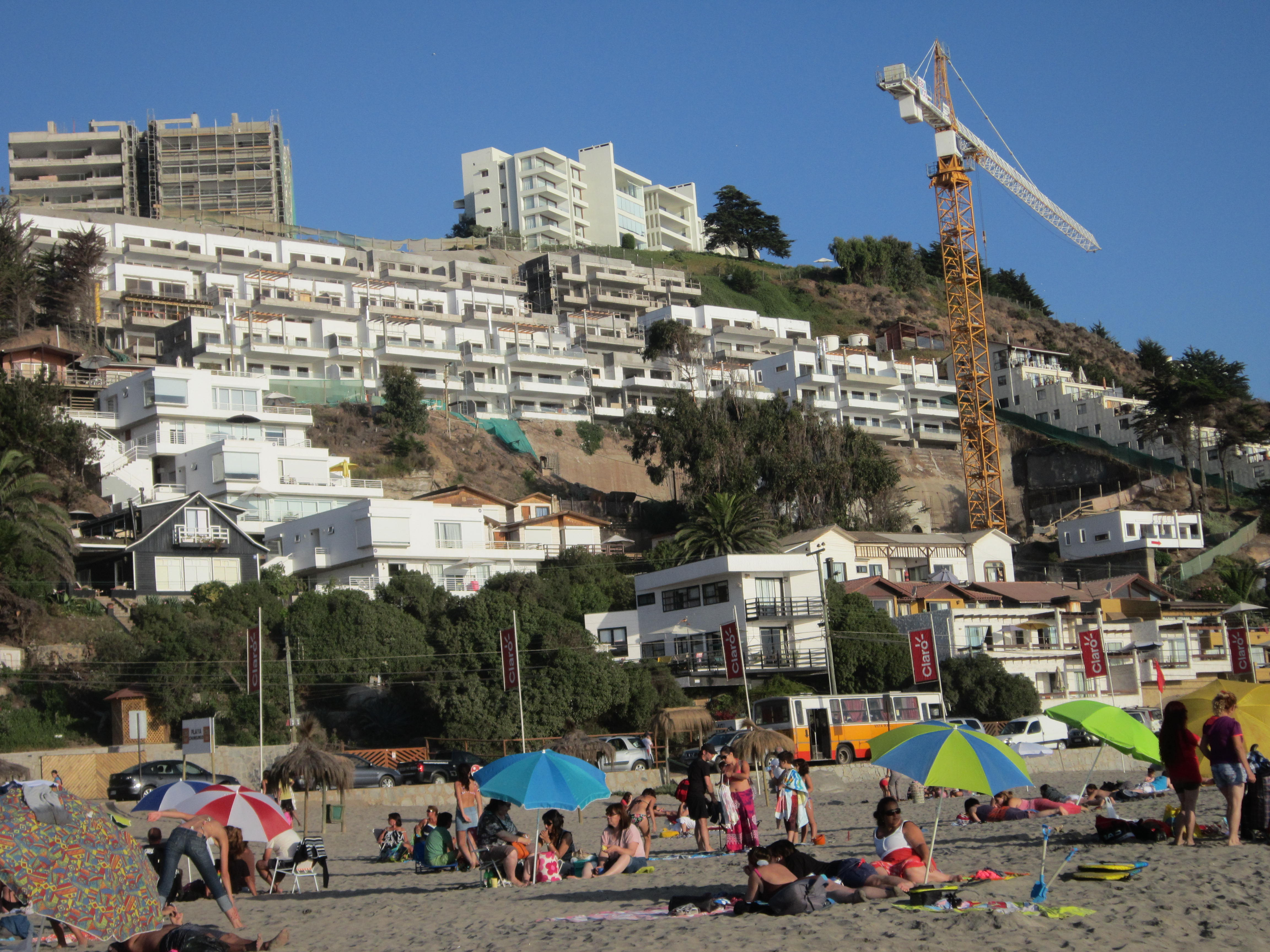 Desarrollo inmobiliario en playa de Maitencillo en 2013